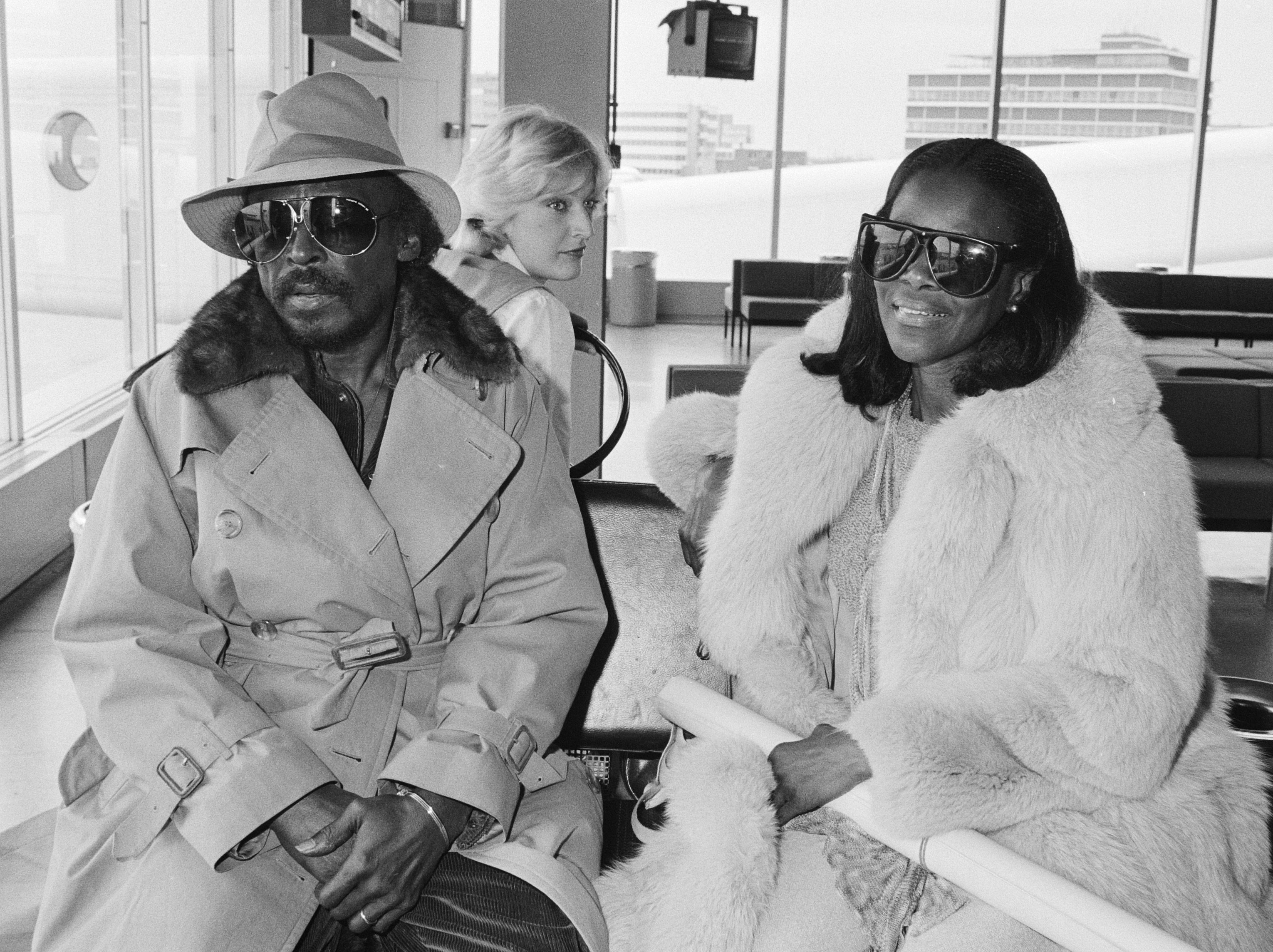 Aankomst jazz-trompetist Miles Davis op Schiphol. Miles Davis en zijn vrouw Cicely Tyson (actrice Roots)